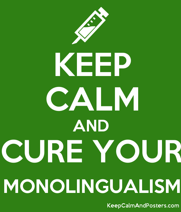 "הישאר רגוע ורפא את חד-הלשוניות שלך". אמירה הומוריסטית בנוגע לחד-לשוניות על גבי הכרזה המפורסמת שפרסמה ממשלת בריטניה ב-1939 וכיום משמשת במגוון הקשרים אחרים